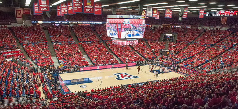 애리조나대학교